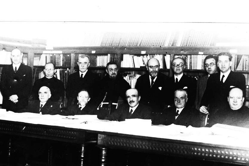 Sociedad de Estudios Vascos